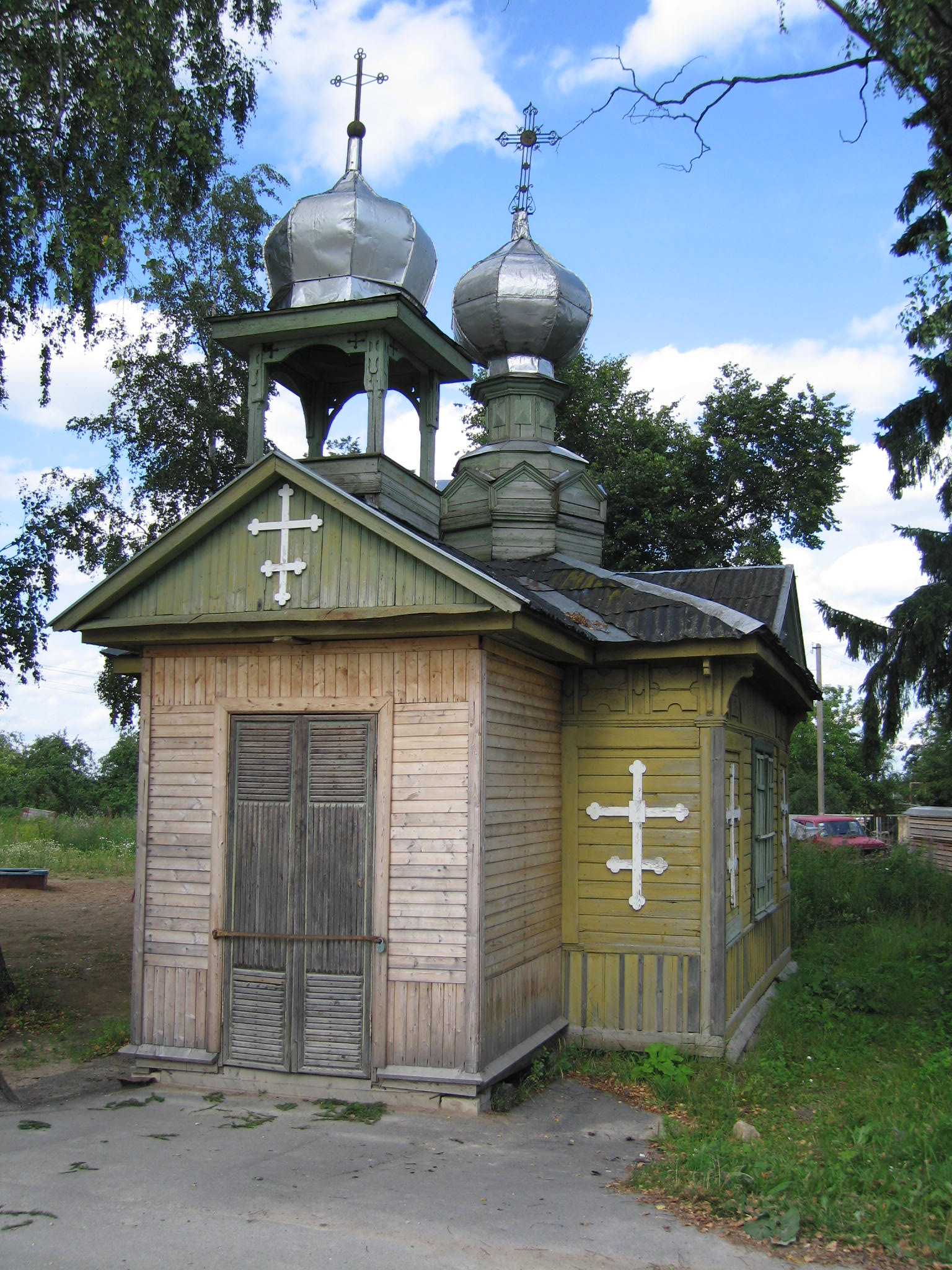 Часовня в д.Большево. Сиверская, Гатчинский р-н, Ленинградской области.